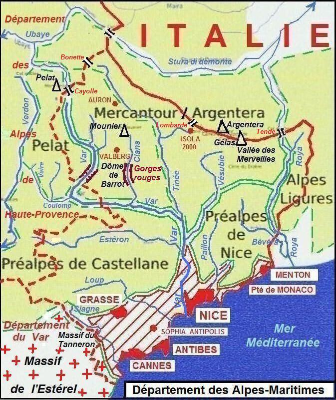 Géographie du département des Alpes-maritimes (06 - FRANCE). Réalisation André Payan-Passeron - diplômé d'études supérieures de géographie - à partir d'un extrait de la carte "Massifs des Alpes.png" de Wikimédia Commons réalisée les 11/09/2006 et 04/01/2007 par Lango puis par Gemini 1980.